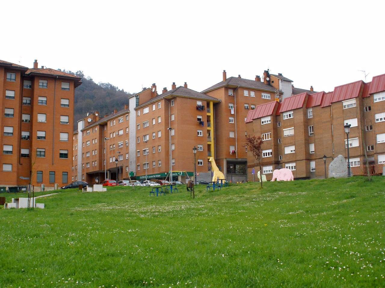 Riaño de Langreo (Asturias)